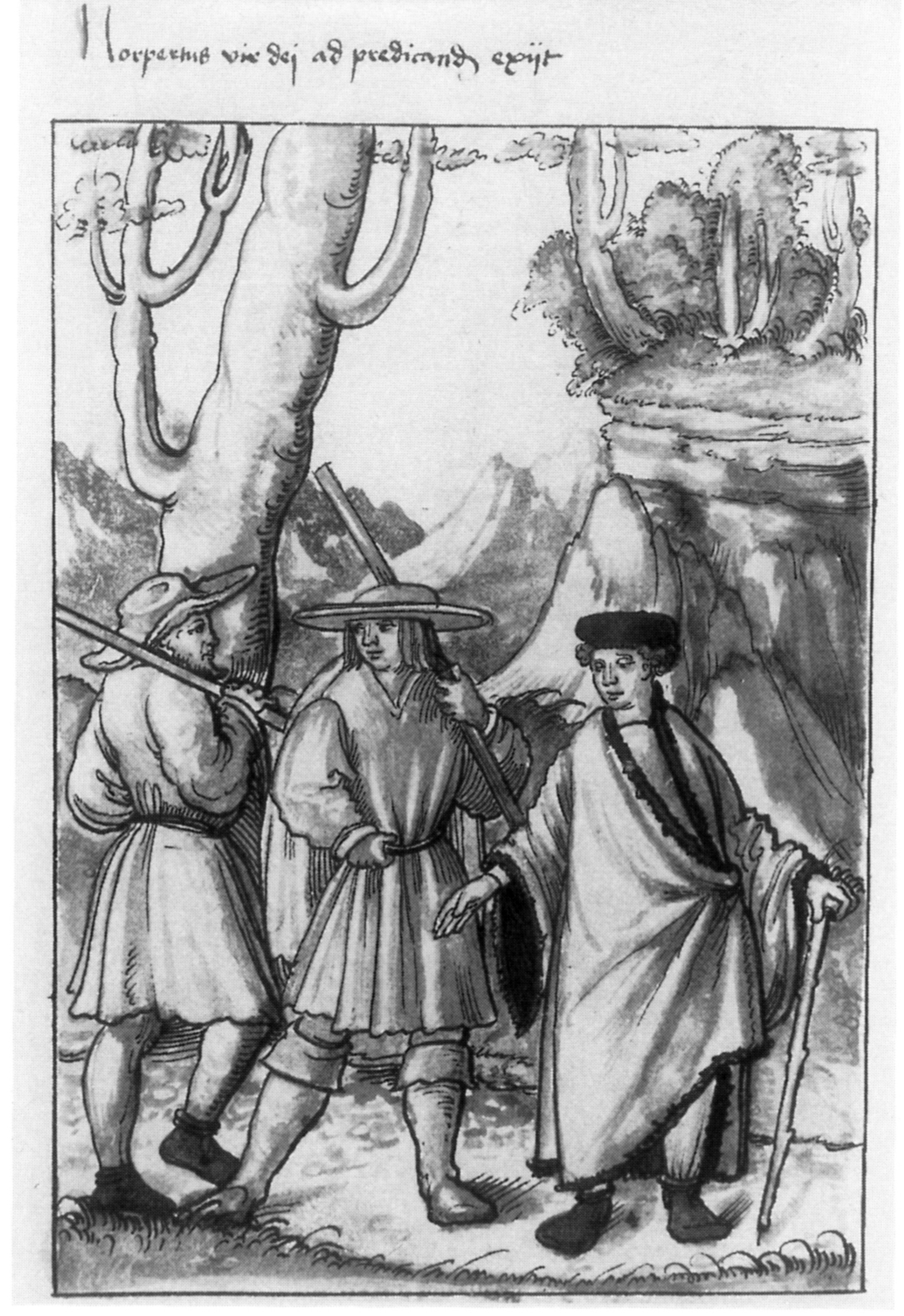 Norbert unterwegs mit den ersten Gefährten; aus dem Norbert-Zyklus im so genannten Traditionskodex aus Kloster Weißenau, heute Fürstlich Waldburg-Zeil'sches Gesamtarchiv, Schloss Zeil, ZA Ms 41; fol. 8